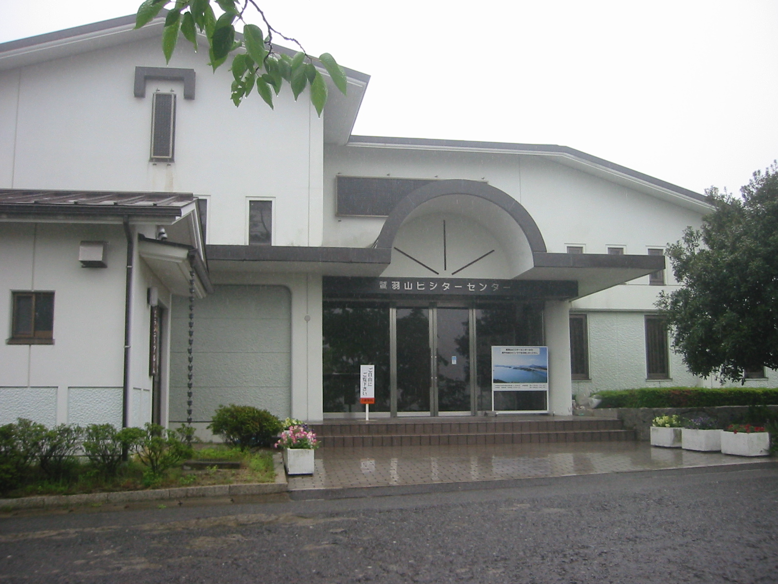 岡山県鷲羽山ビジターセンター